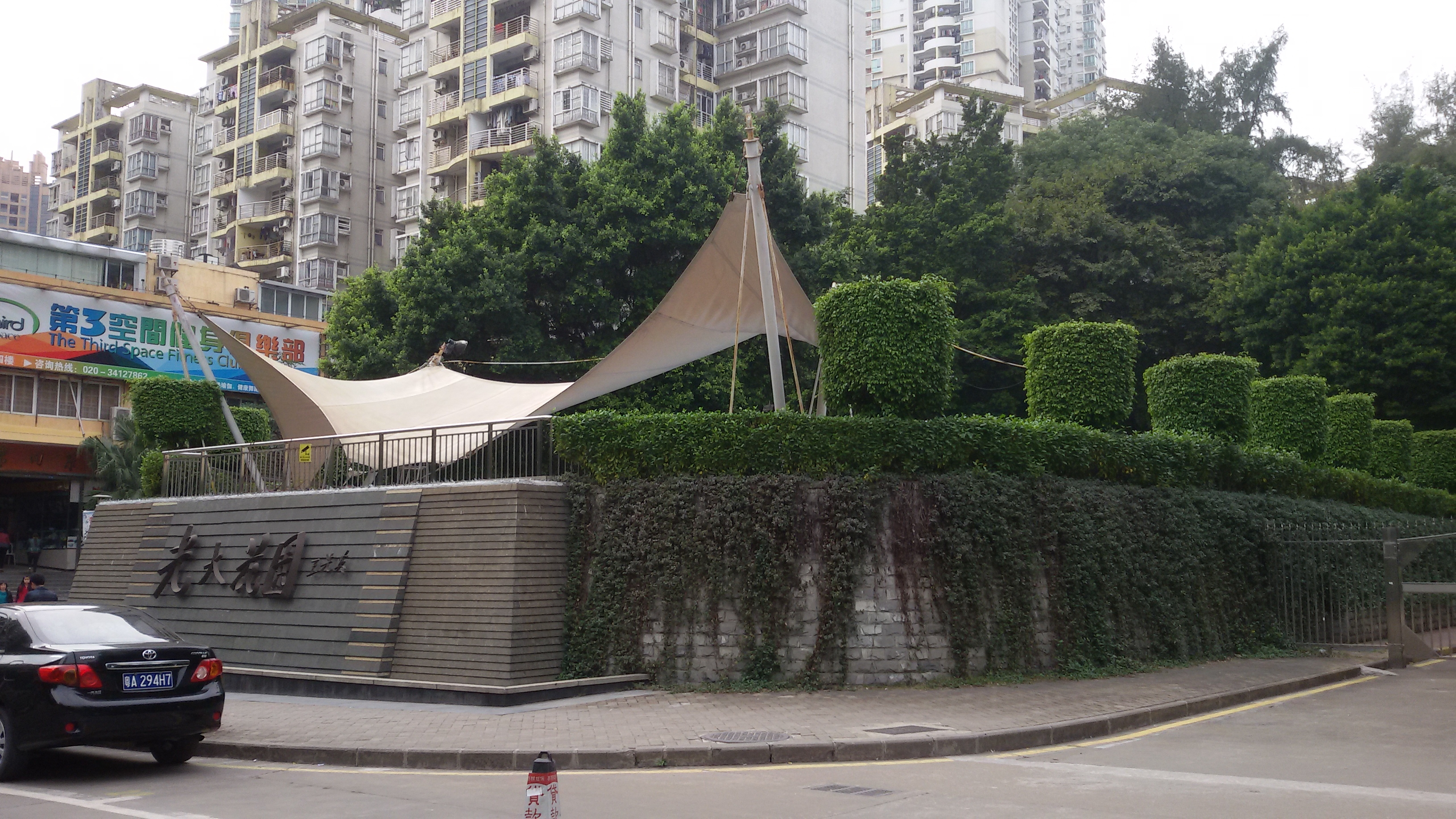 粵語: 广州嘅光大花园